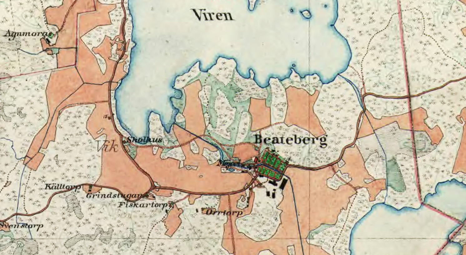 Beateberg på Häradsekonomiska kartan